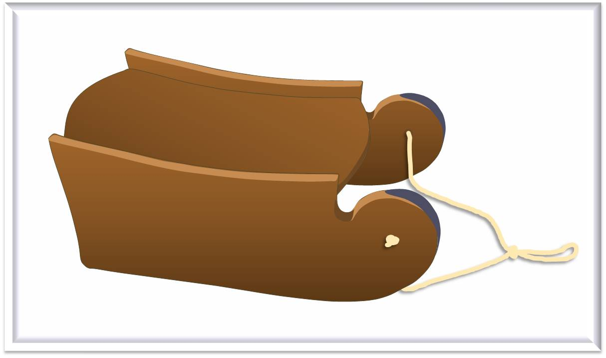 Küttiger Frosch (Schlitten)